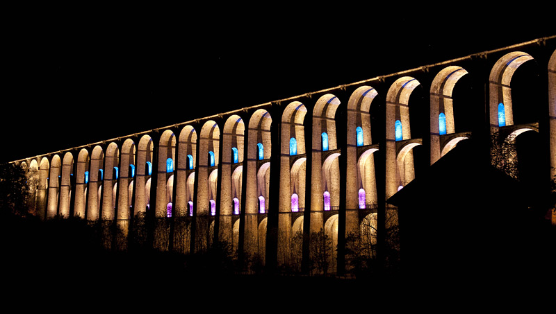 Depuis le 8 juin 2012, le viaduc de Chaumont bénéficie d'un programme de mise en lumières.